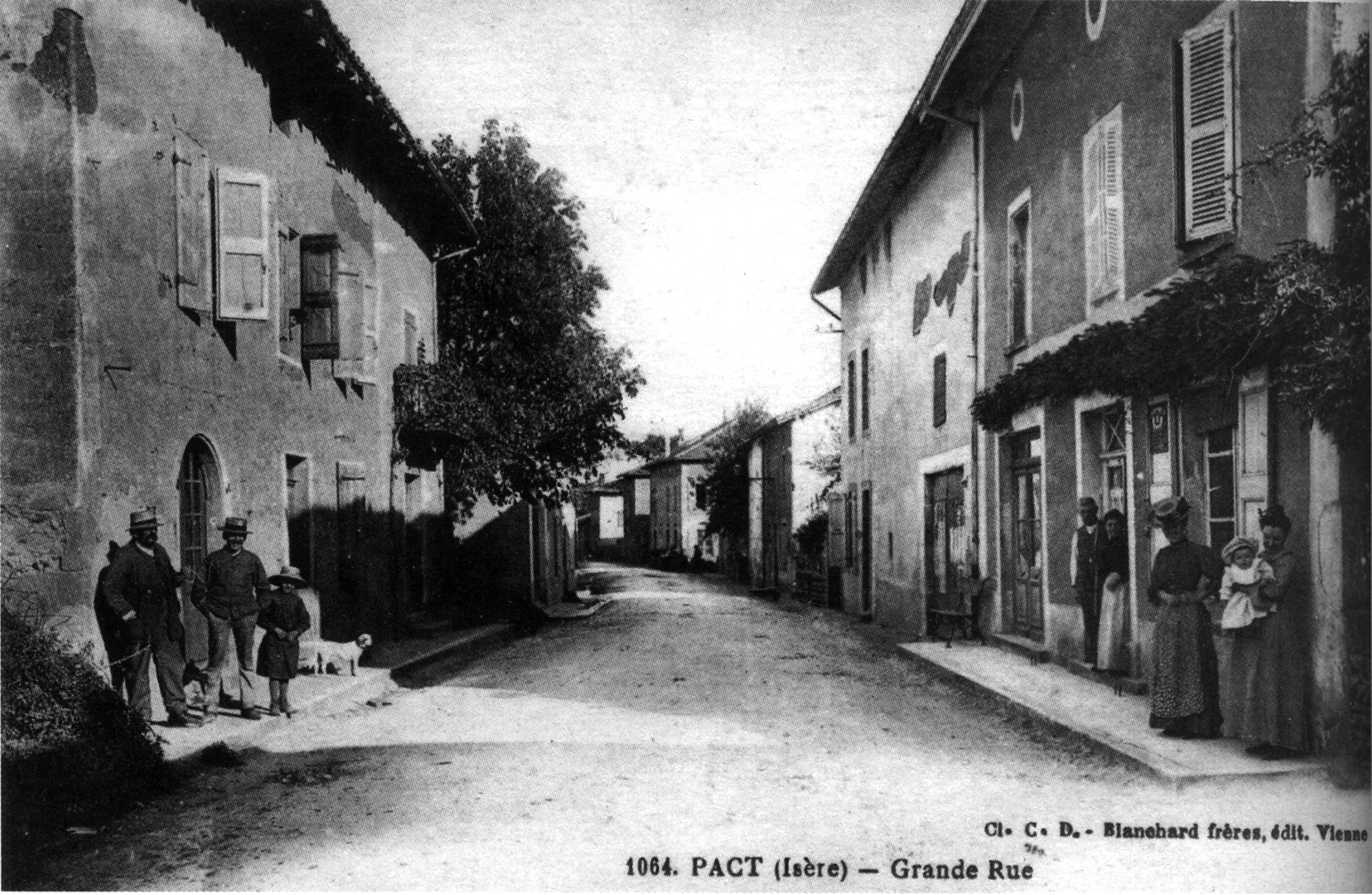 Pact, Grande Rue en 1908